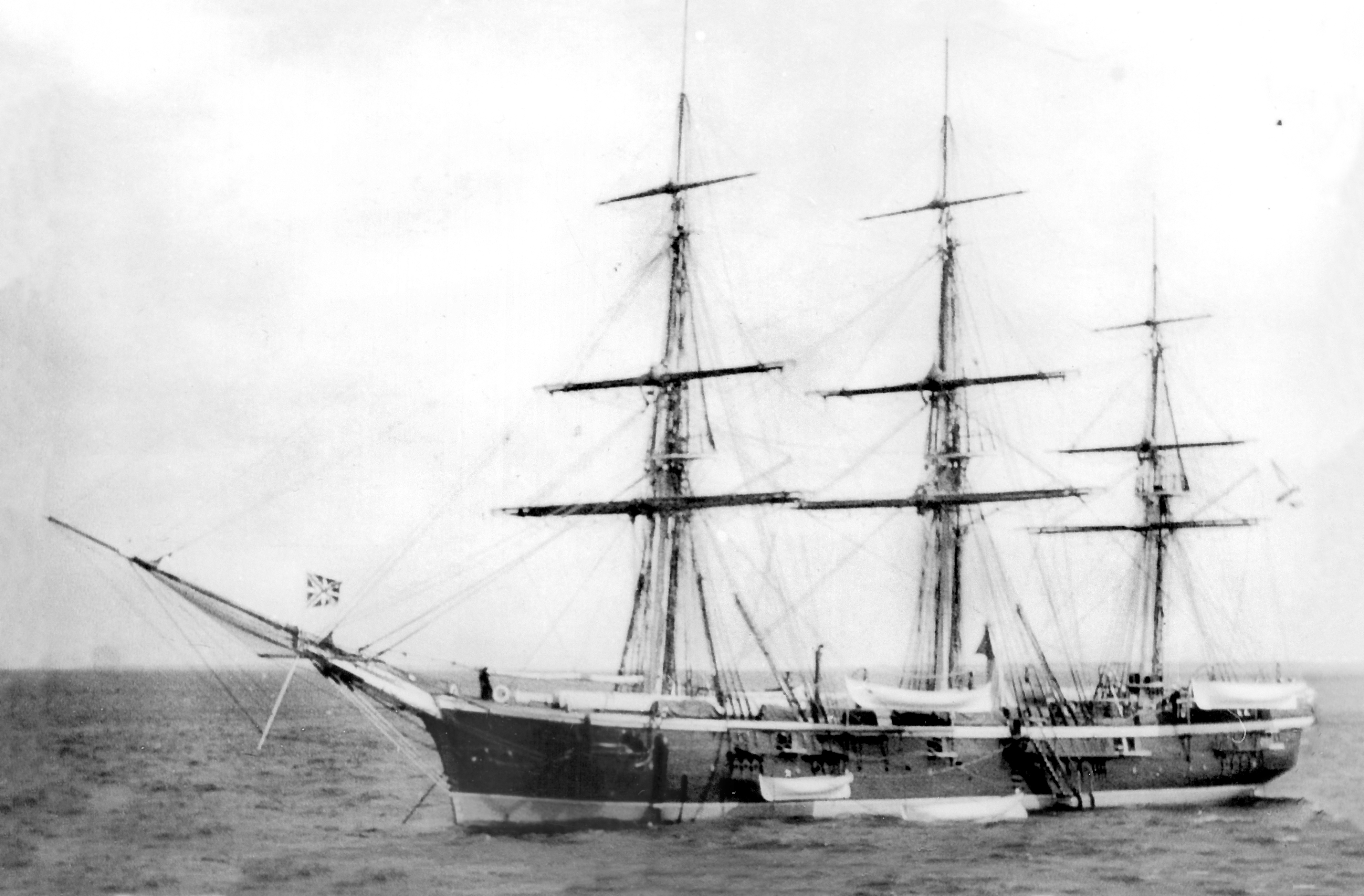 Боярин в море